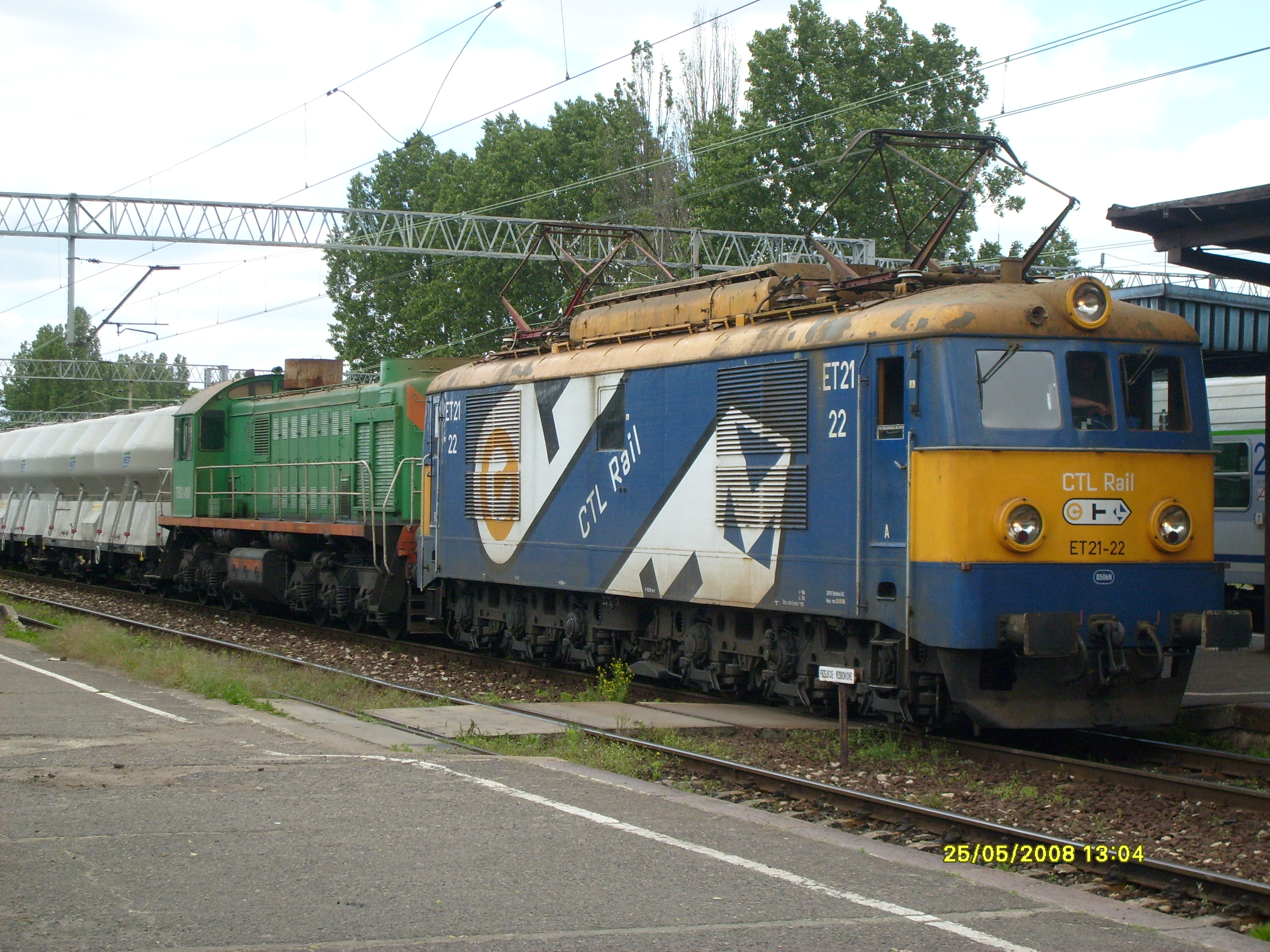 Lokomotywa elektryczna ET21-22 w malowaniu przewoźnika CTL Rail oraz lokomotywa spalinowa TEM2-098 przewoźnika PTKiGK Rybnik na stacji kolejowej w Zielonej Górze.